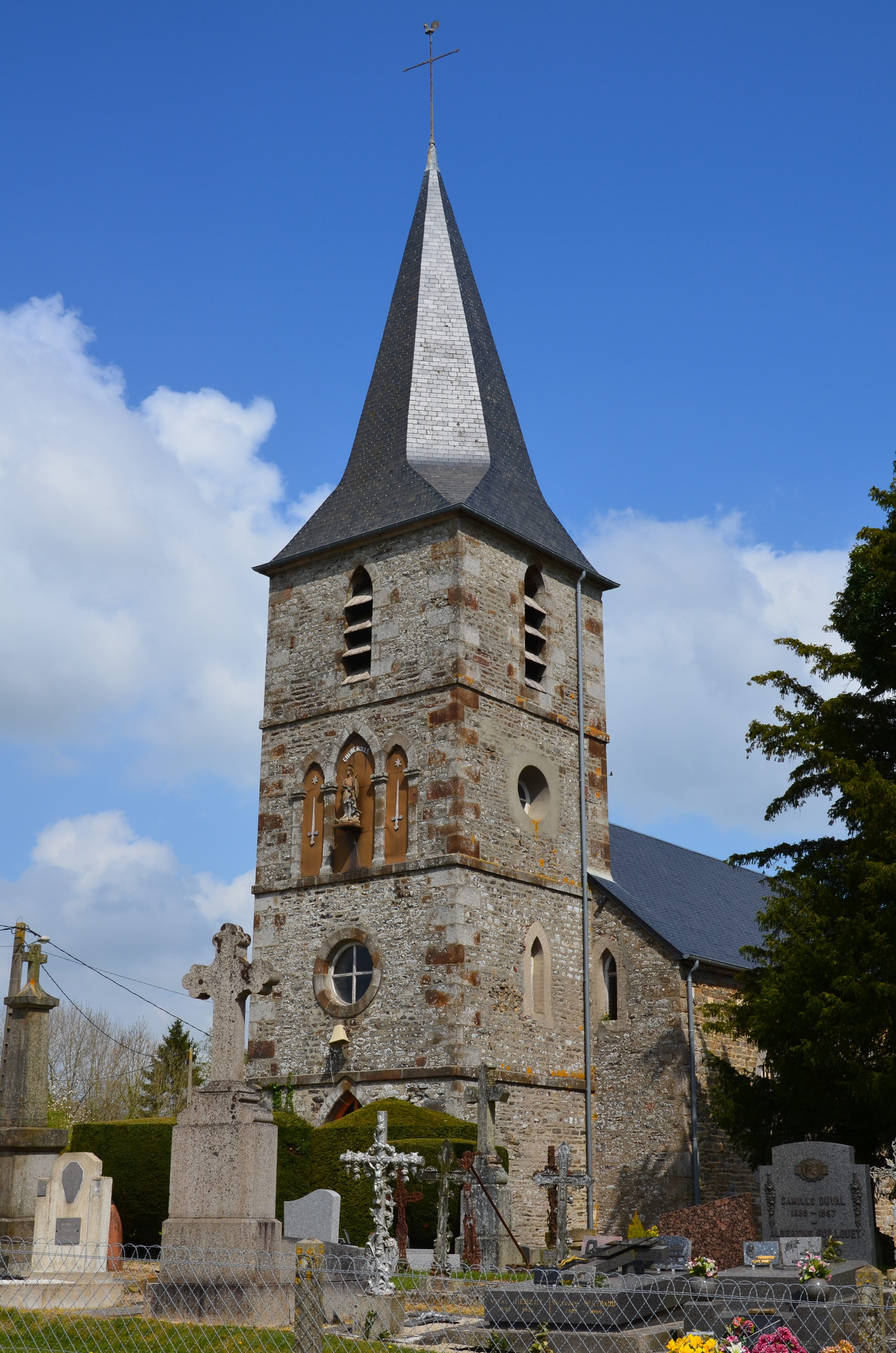 Clocher de l'église Saint-Georges de Chênedollé.